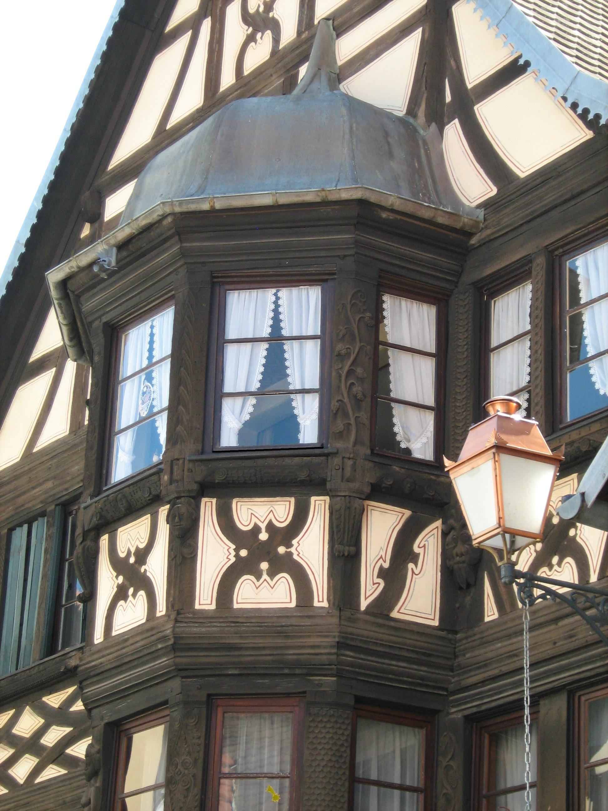 Oriel de la Maison Pfluger à Bouxwiller (67), France